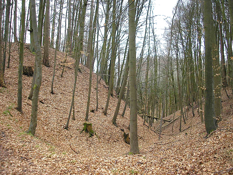 Frühmittelalterliche Schanze Wagesenberg bei Pöttmes (Landkreis Aichach-Friedberg, Bayerisch-Schwaben). Blick nach Süden in den Halsgraben der Hauptburg. Eigene Aufnahme, März 2008 / Early Middle Ages hillfort Wagesenberg near Poettmes (Landkreis Aichach-Friedberg, Bavaria, Germany). The moat of the central castle, looking south. Own photo, March 2008